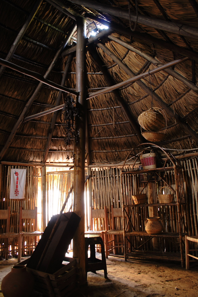 Ruca (del mapudungun ruka, "casa") es el nombre de la vivienda tradicional de los mapuches, un pueblo que habita en Chile y Argentina.